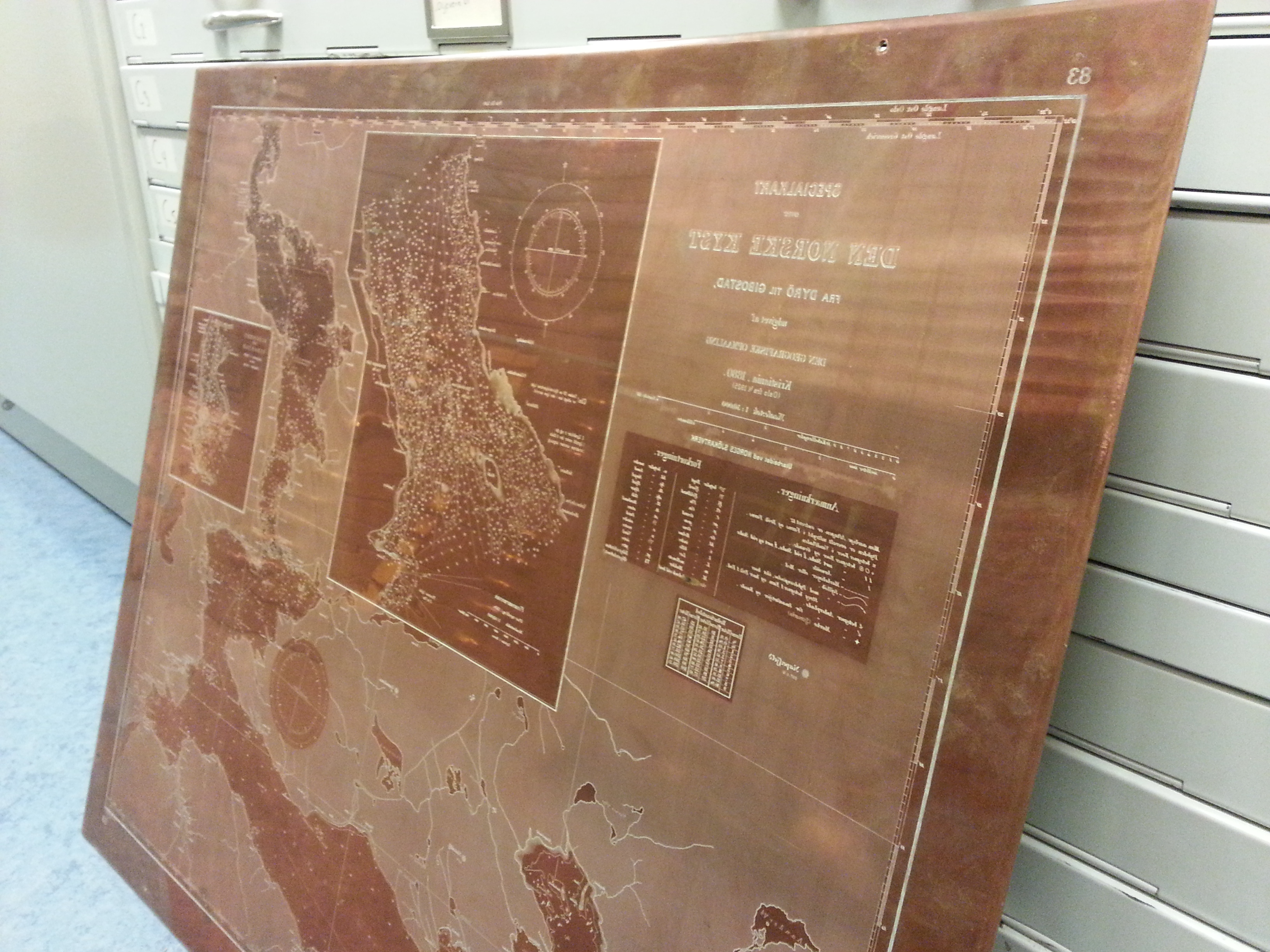 Kobberplate brukt til trykking av norske sjøkart